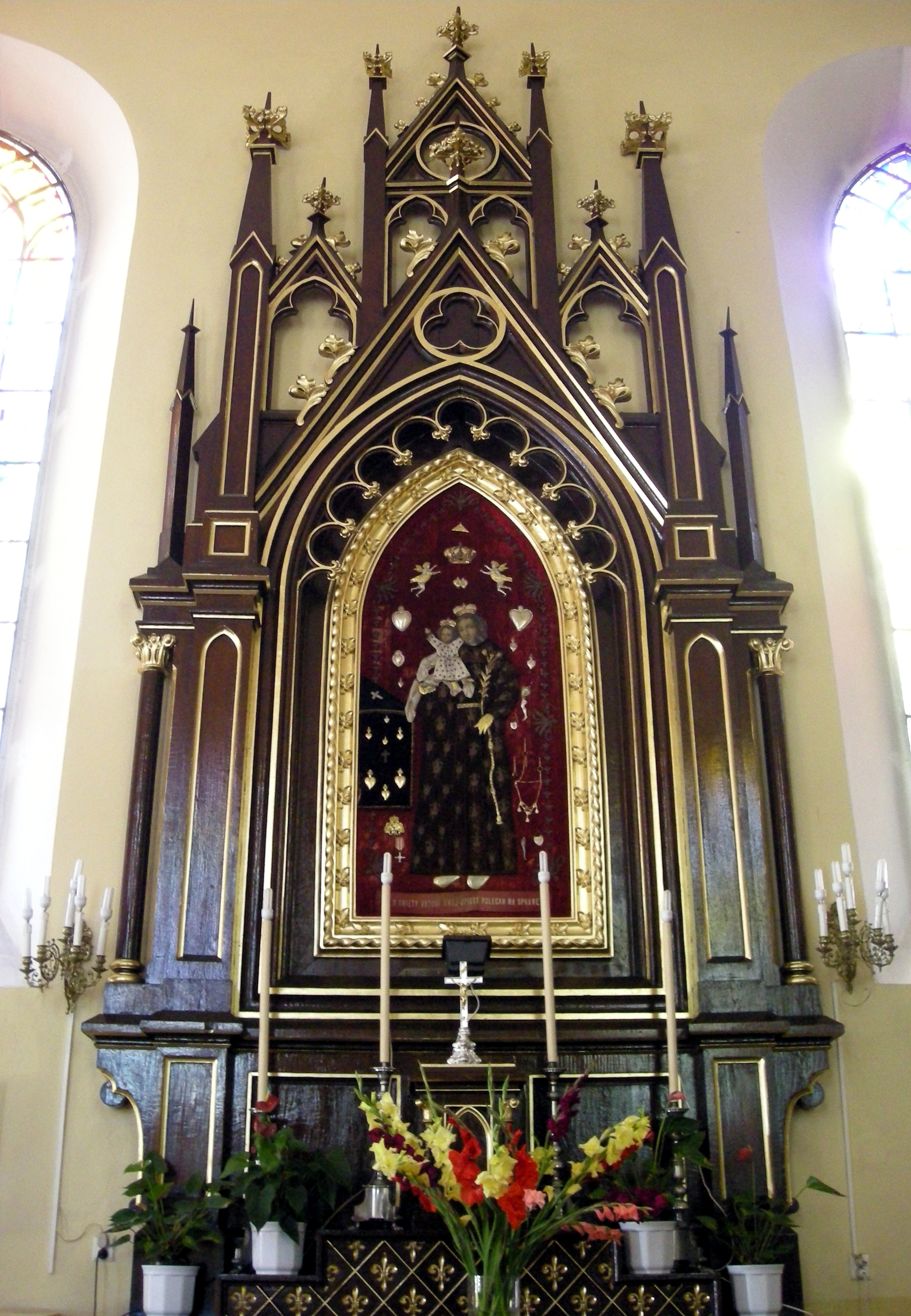 Ołtarz św. Antoniego w kościele parafialnym w Huszlewie.